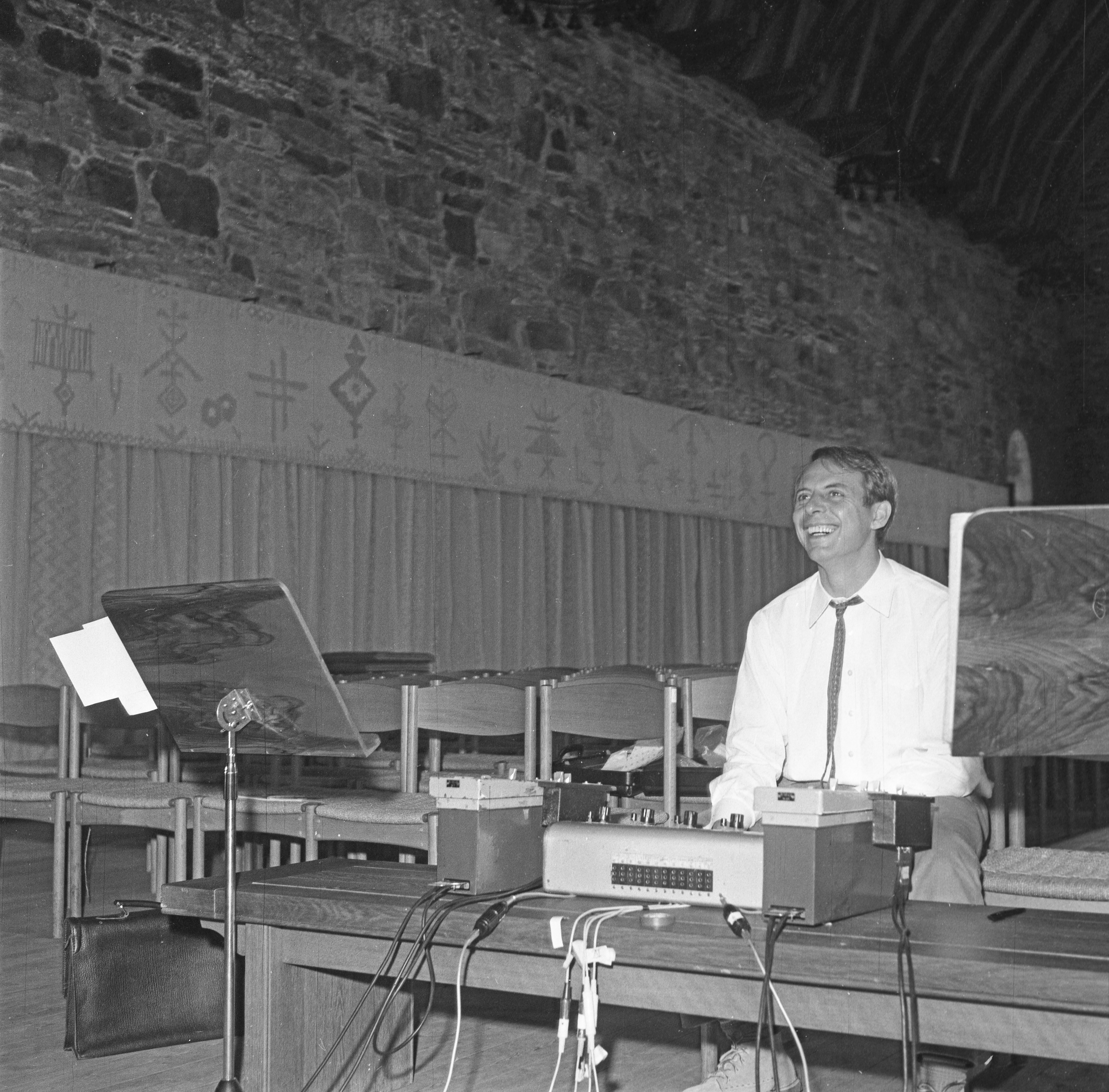 Format: 120 mm sort/hvitt negativ Dato / Date: 28 Mai 1967 Fotograf / Photographer: Eirik Sundvor (1902 - 1992) Sted / Place: Håkonshallen, Bergen, Hordaland Wikipedia: Karlheinz Stockhausen (1928 - 2007) Eier / Owner Institution: Trondheim byarkiv, The Municipal Archives of Trondheim Arkivreferanse / Archive reference: Tor.H43.B78.F14213 Merknad: Karlheinz Stockhausen under prøvespilling i Håkonshallen ved Festspillene i Bergen 1967. Konserten ble avholdt 29 mai 1967 kl. 20:00, og hadde følgende musikkstykker på programmet: Telemusikk, Klaverstykket IX og Mikrophonie I.